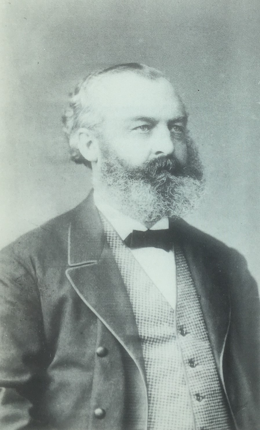 Porträtfotografie des hessischen Psychiaters Dr. Georg Ludwig